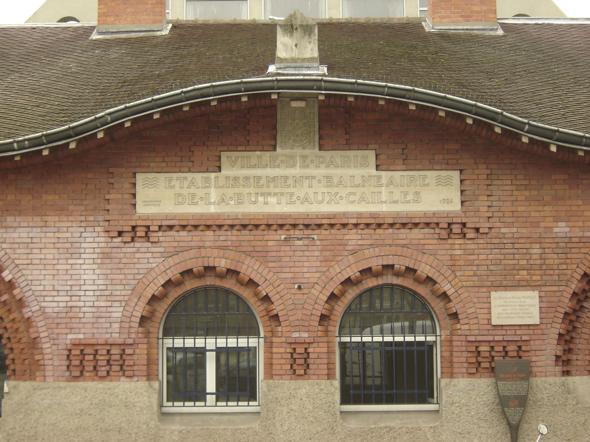 Piscine de la Butte-aux-Cailles, Paris XIIIe (close-up).